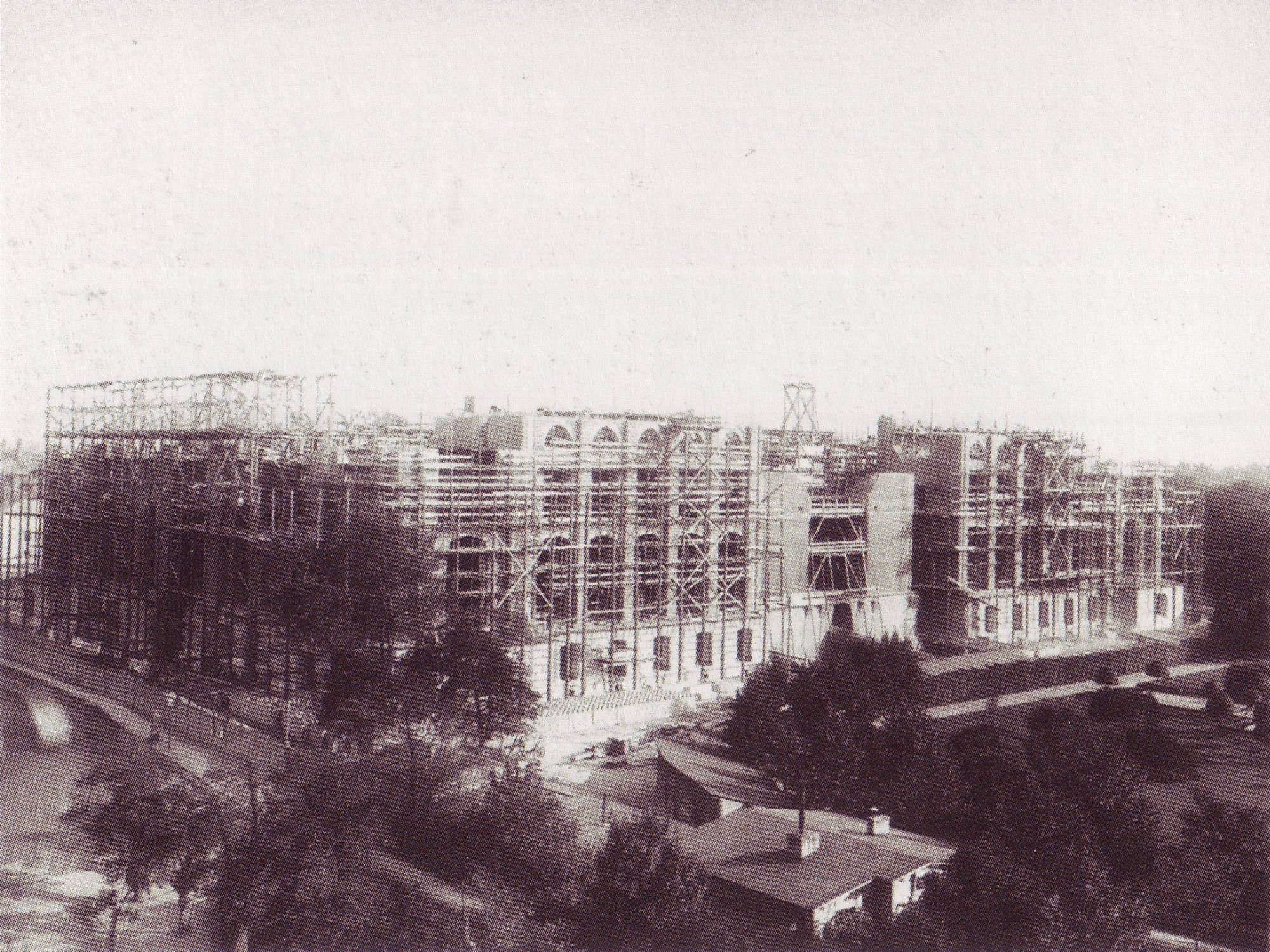 Reichstag under construction, Berlin 1888